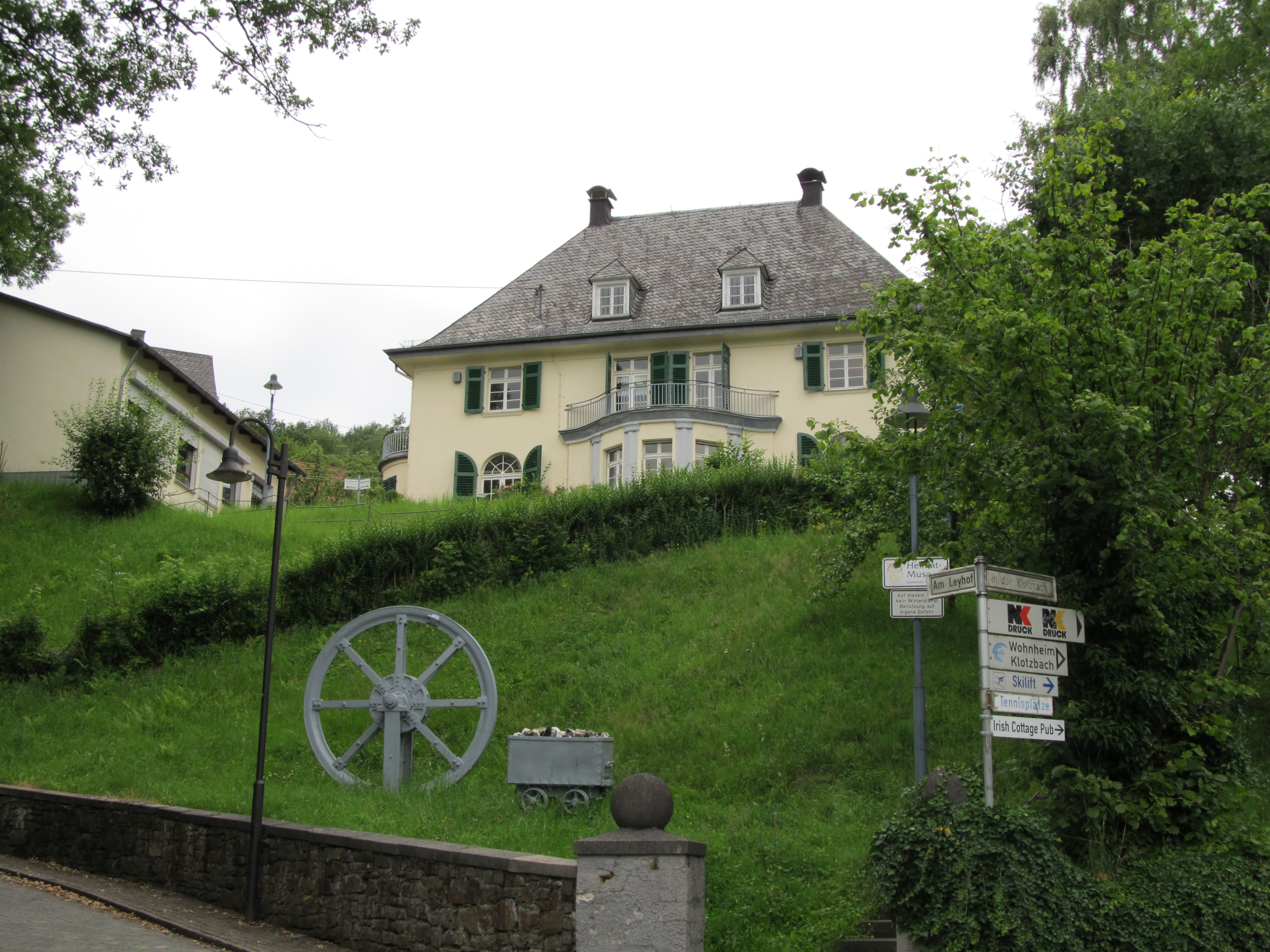 Das Neunkirchener Heimatmuseum (Siegerland).